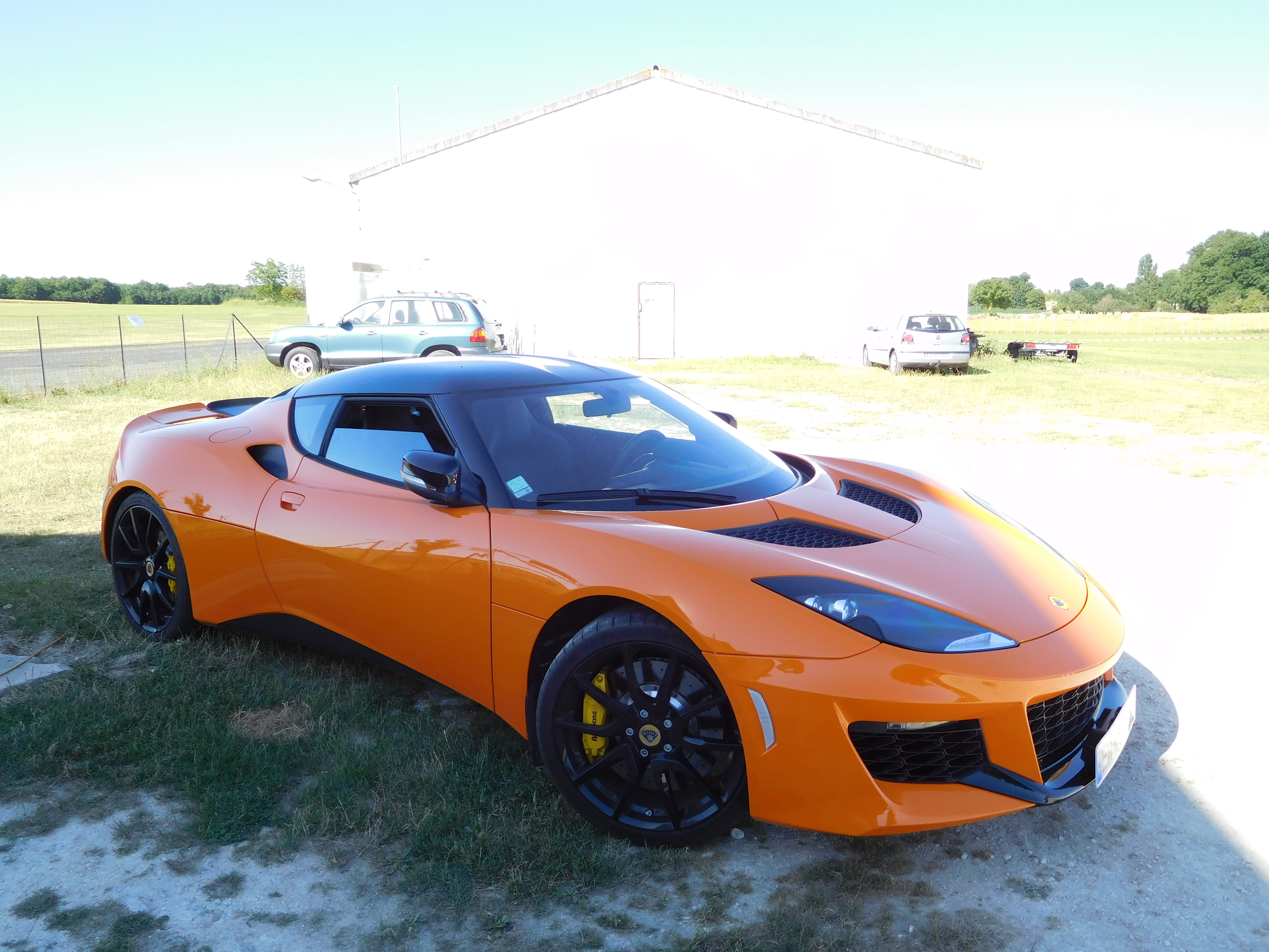 Lotus Evora 400 orange.